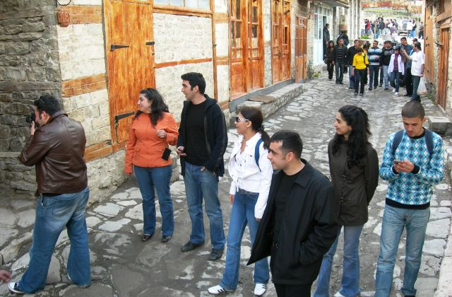 Туристы в Лахиче (Азербайджан)